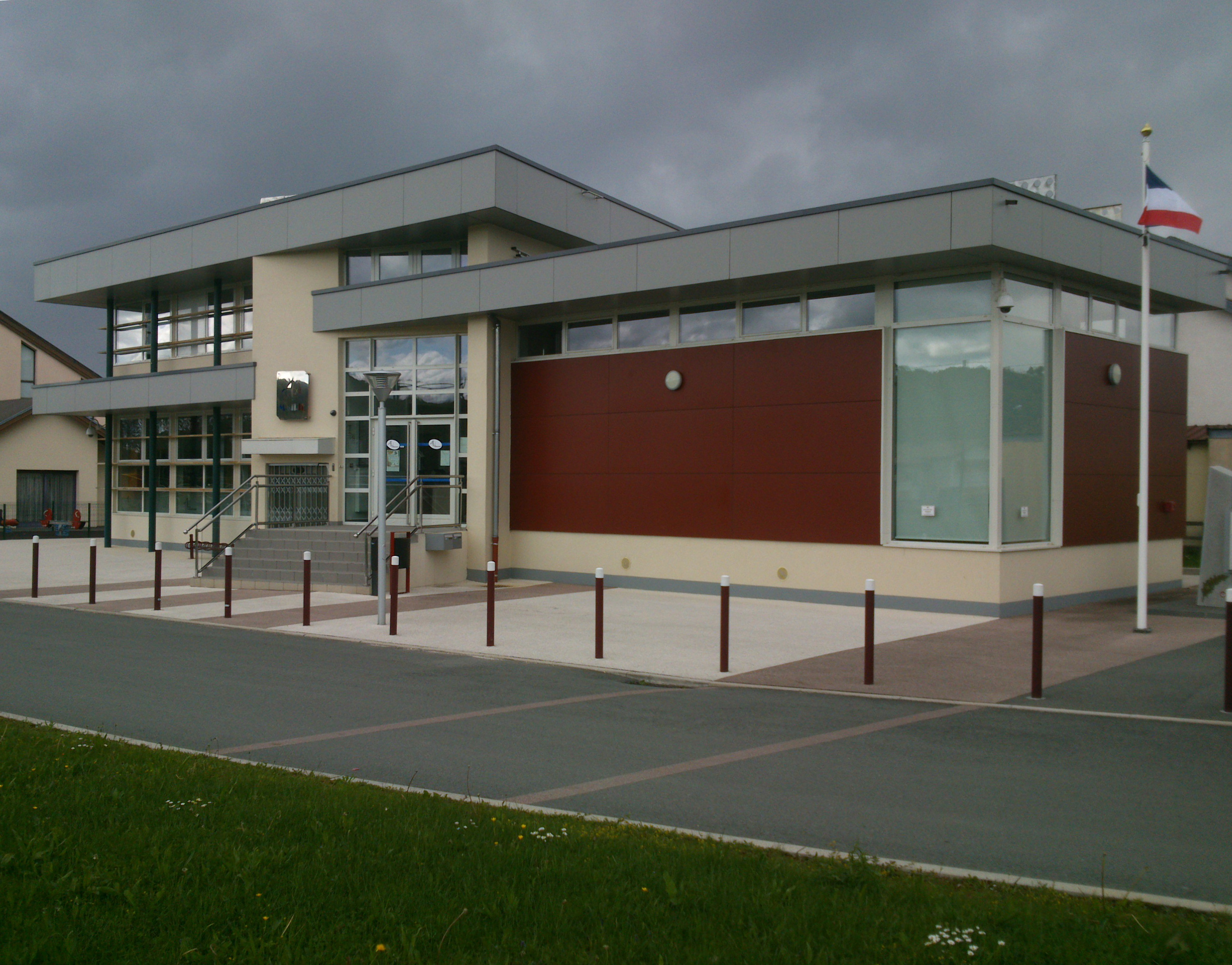 Mairie d'Arbouans, Doubs, France